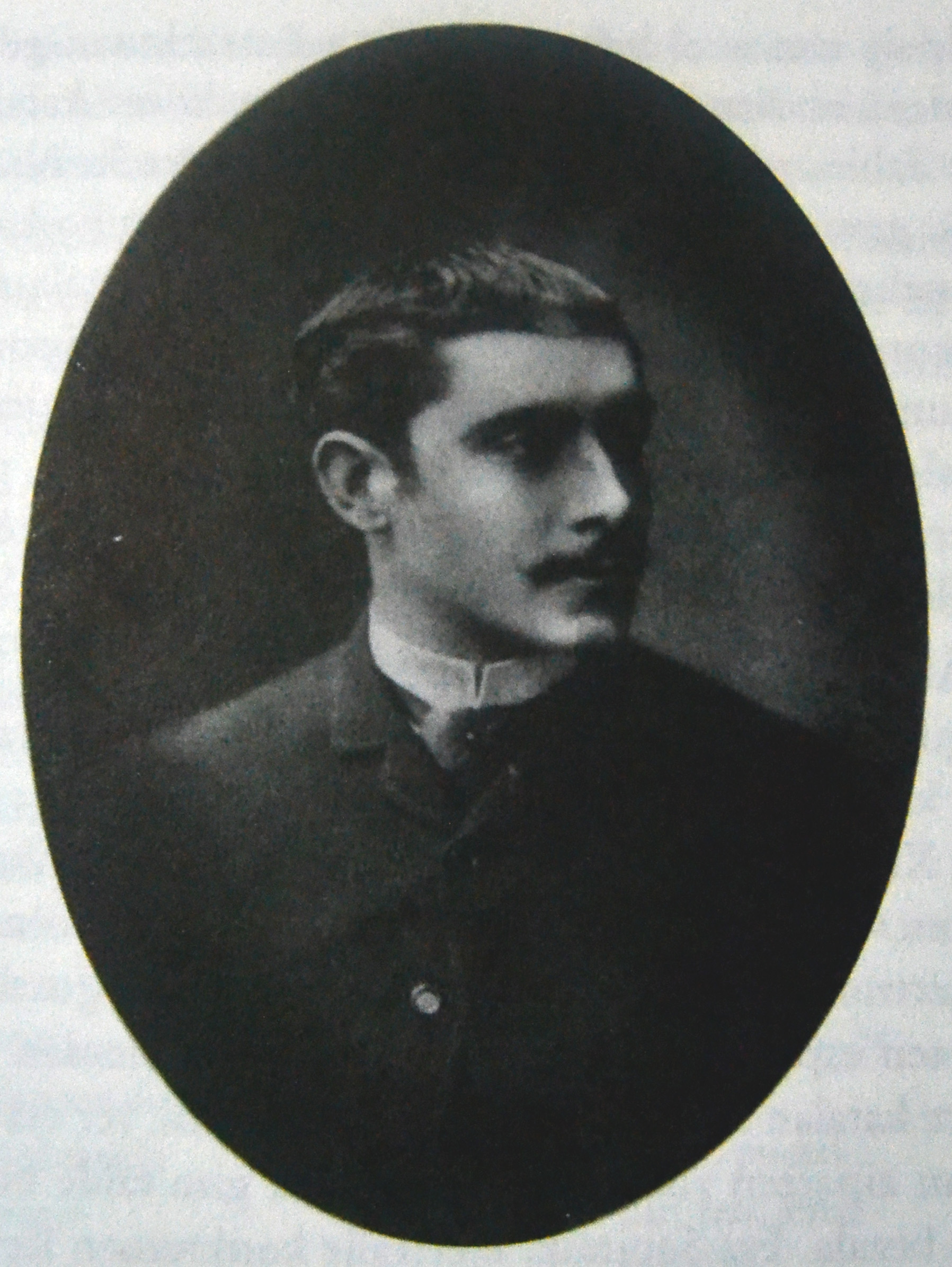 Sabin Arana Goiri gaztearen argazkia Bartzelona bizi izan zen garaian (1883-1888). - Photo of young Sabino Arana Goiri during he lived in Barcelona (1883-1888).